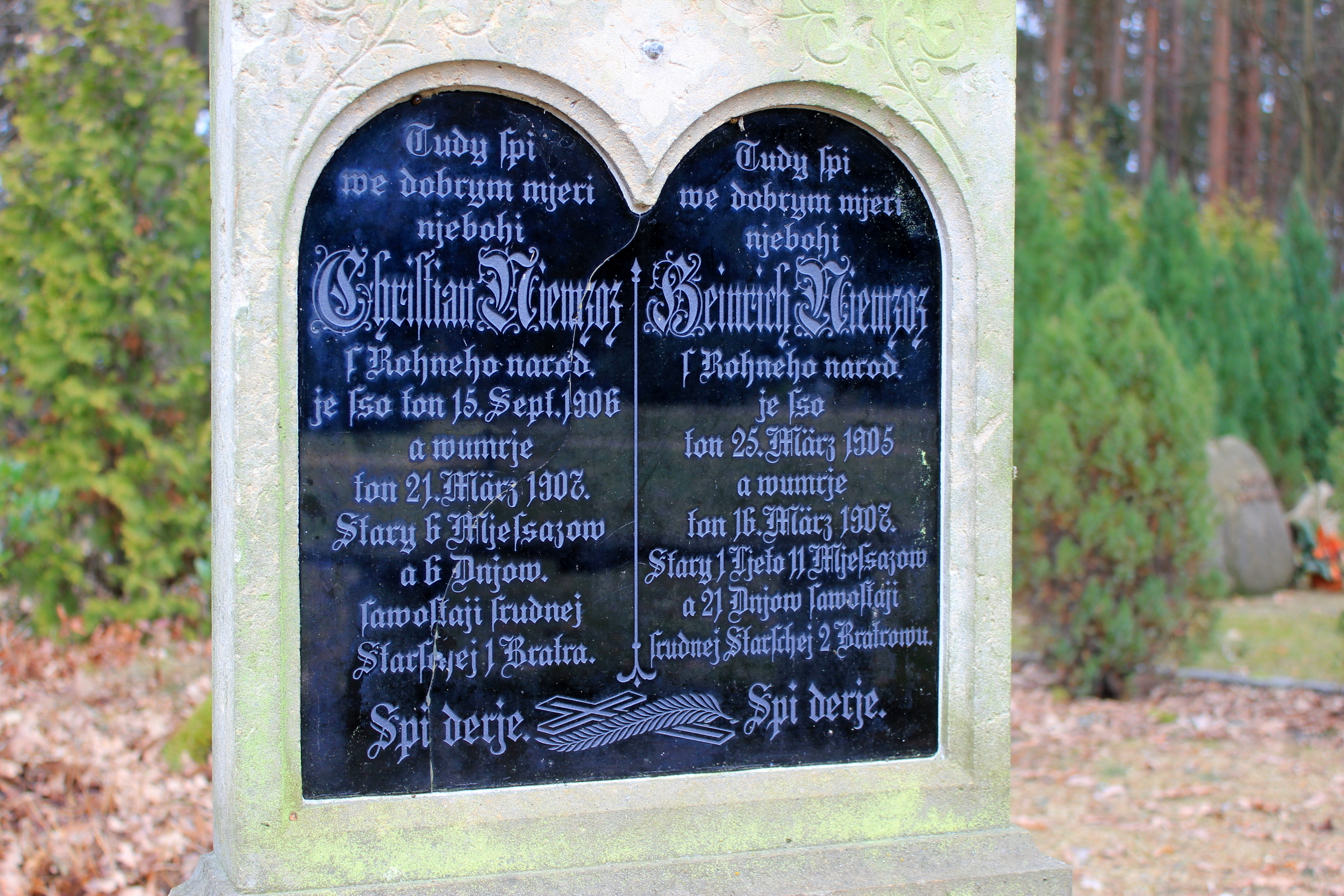 Hornjoserbsce: Serbski narowny kamjeń na Rownjanskim kěrchowje.